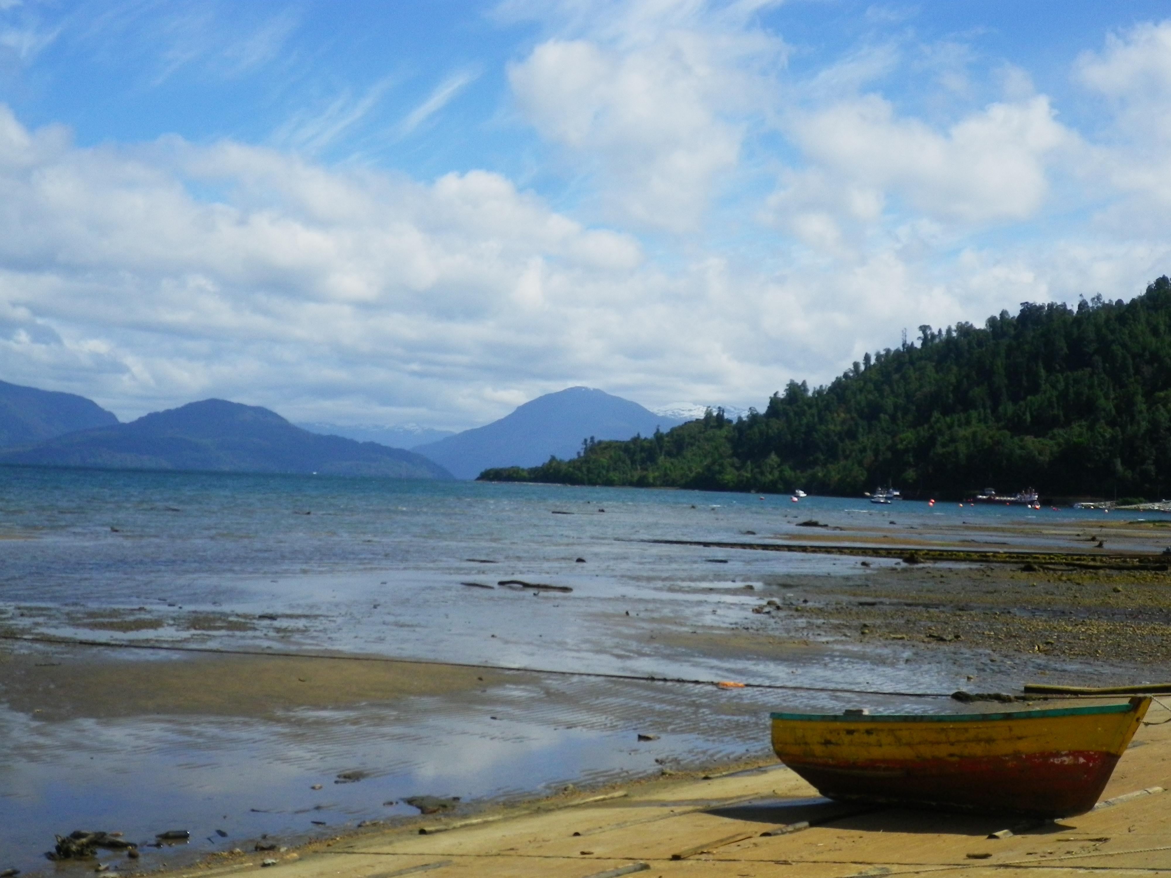 Fiordo Puyuhuapi vito desde el poblado ubicado en la desembocadura del rìo Cisnes, Regiòn de Aysèn, Patagonia chilena. Pentax Optio H90